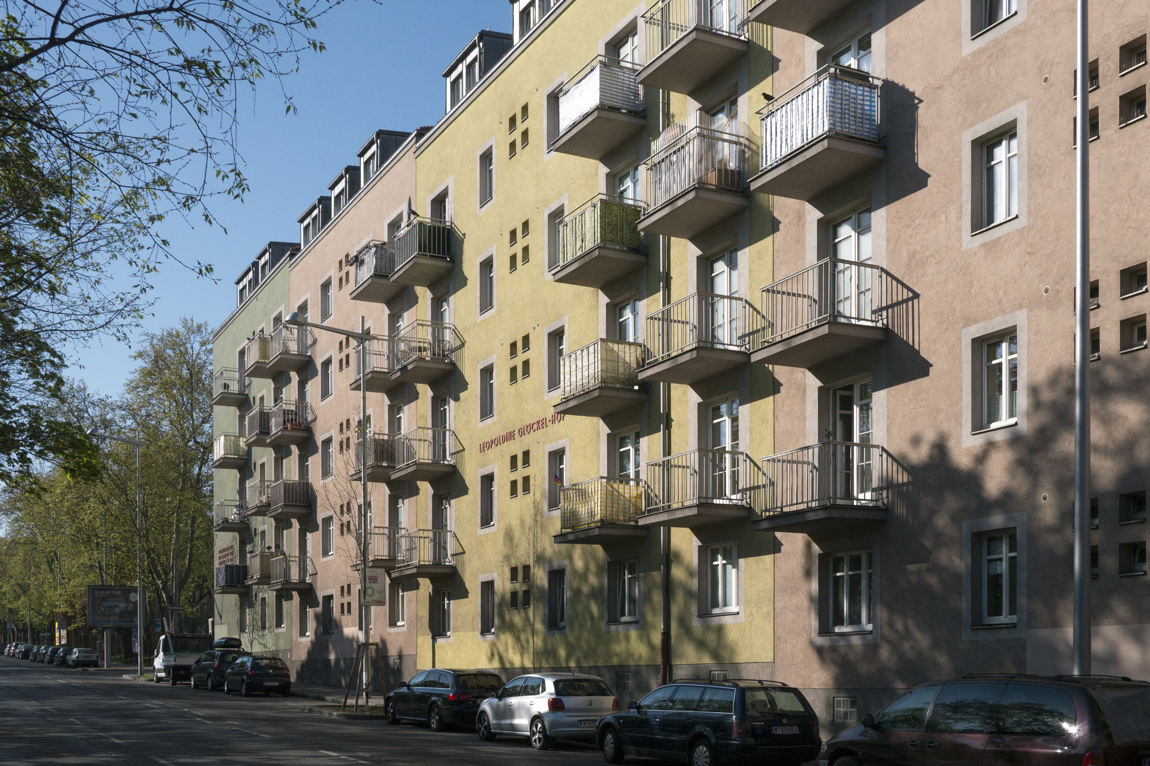 Kommunaler Wohnbau, Leopoldine-Glöckel-Hof